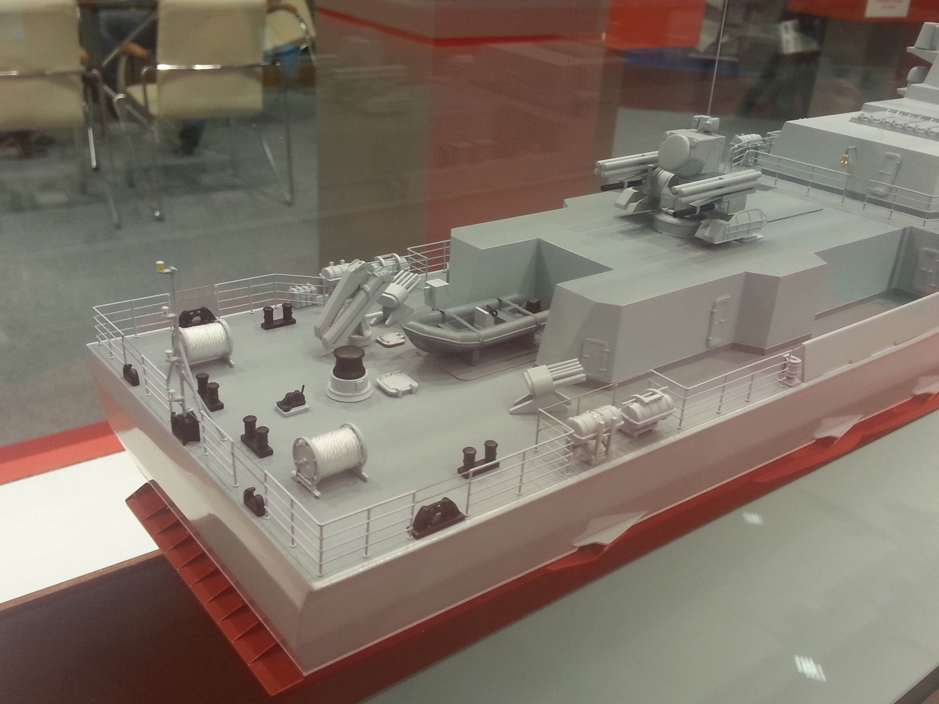 Корма макета корвета проекта 22800 «Каракурт» на выставке «Армия 2016»